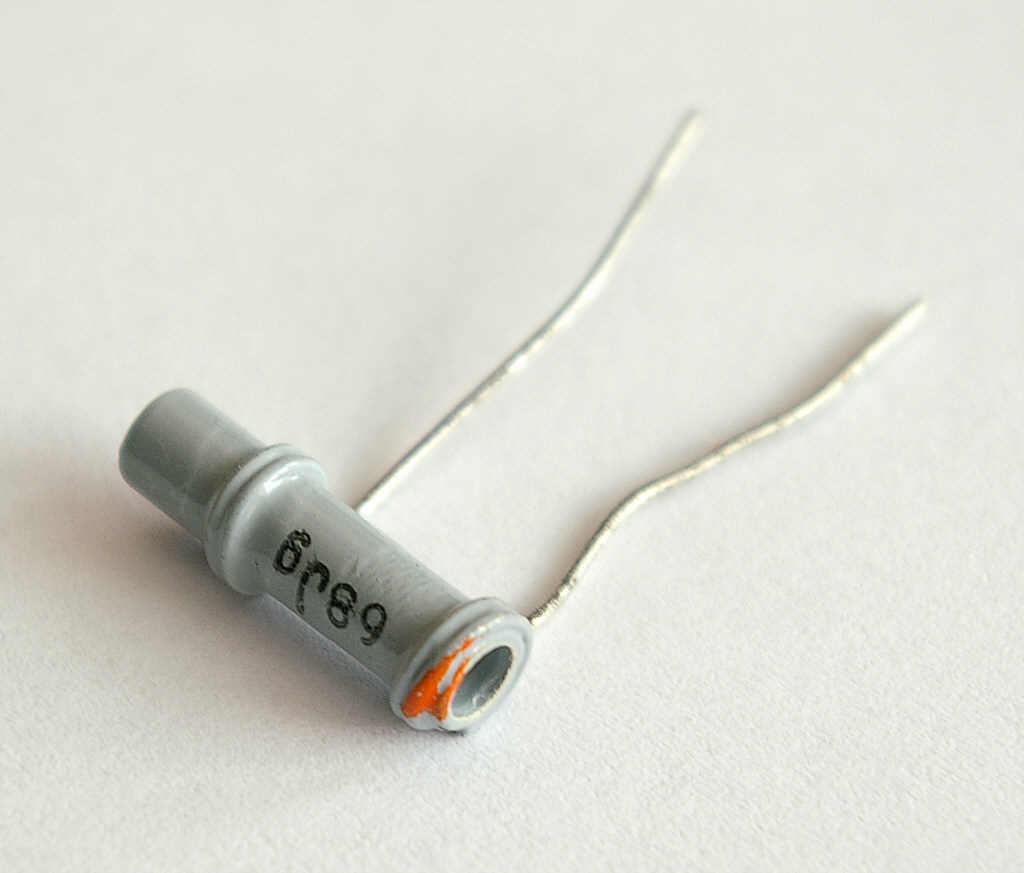 Keramikkondensator 68pF in der veralteten Röhrchenbauform.